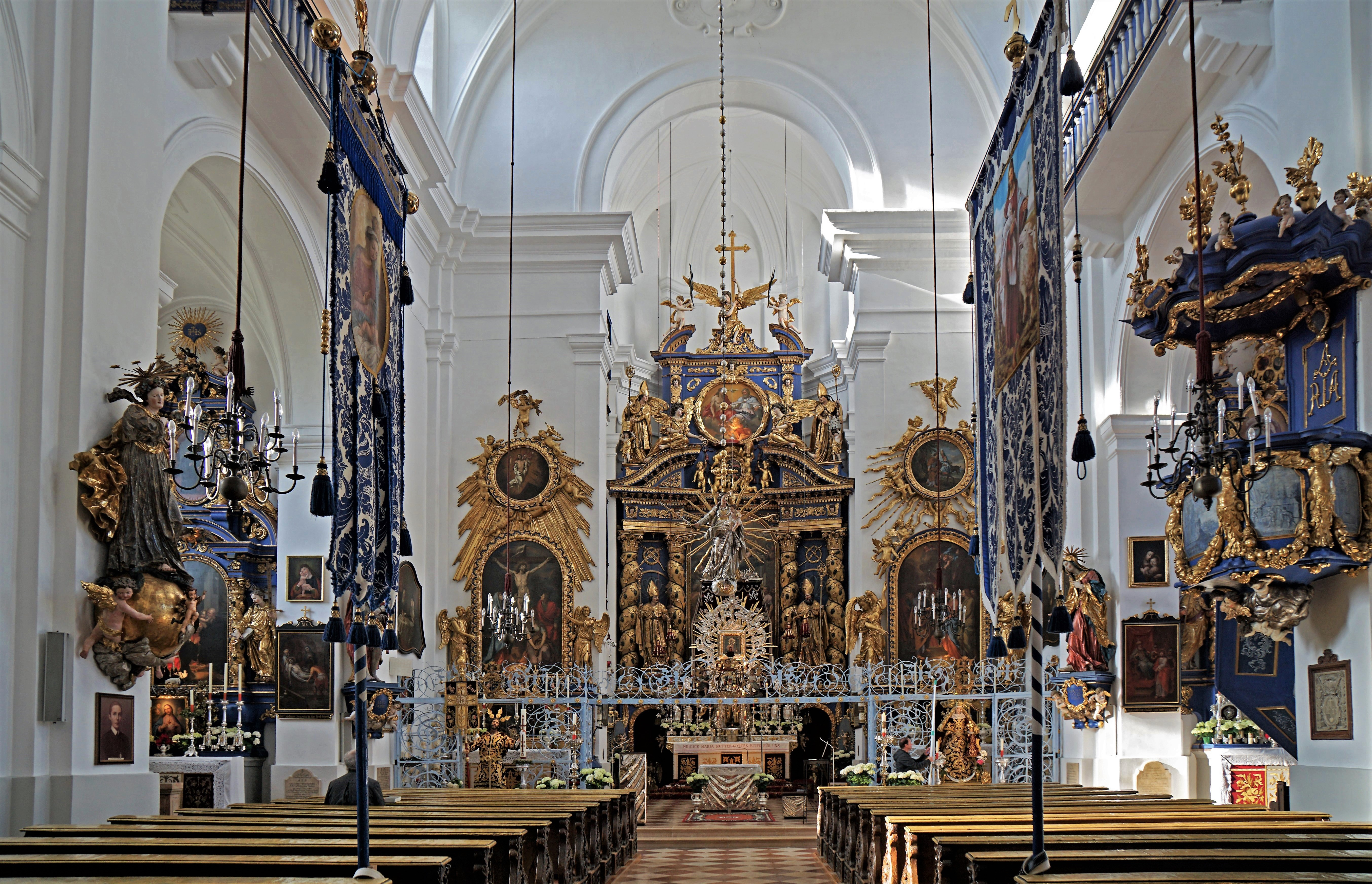 Wallfahrtskirche Maria Plain, Innenansicht